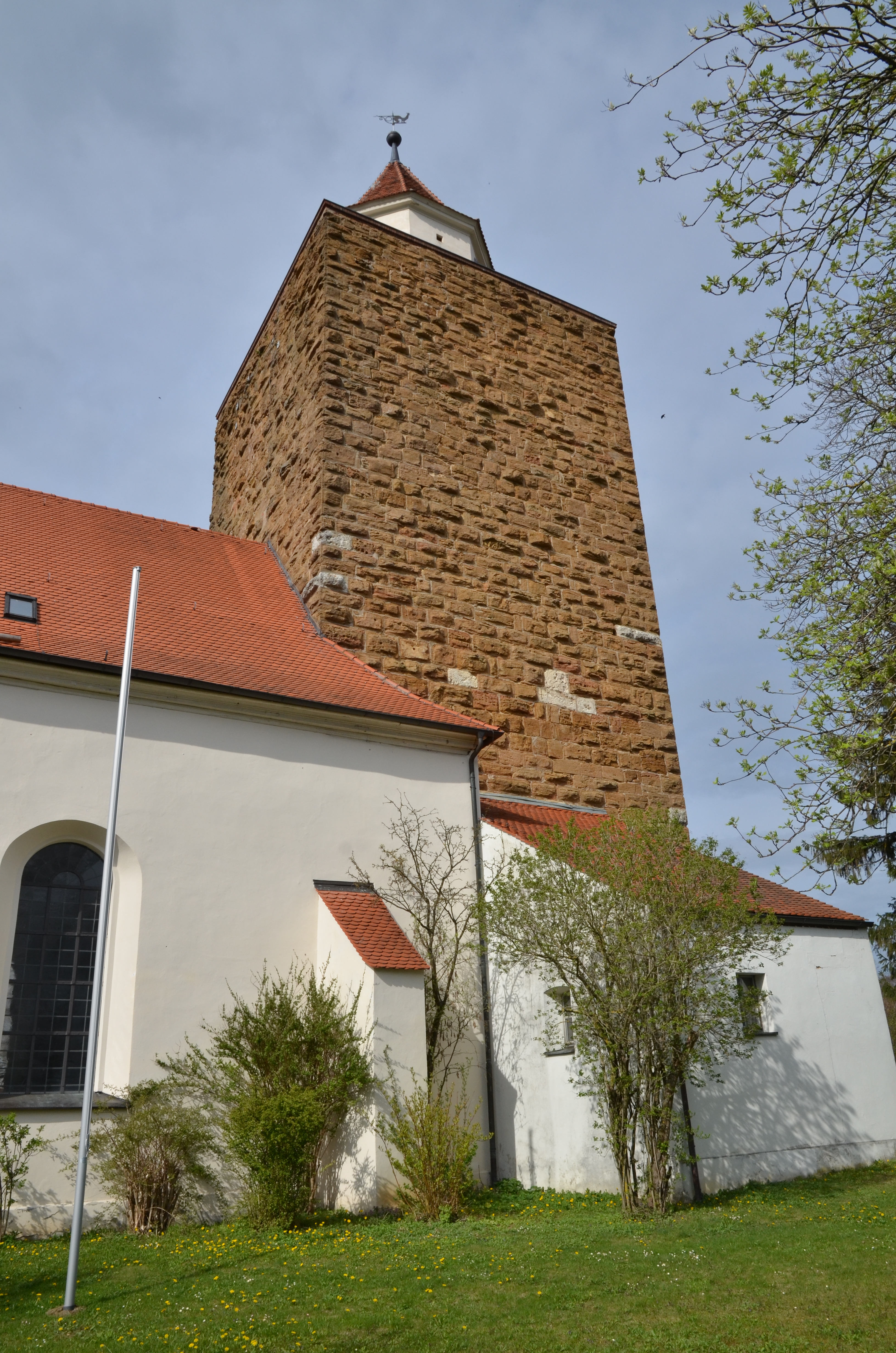 evang.-luth. Kirche St. Johannes der Täufer in Hohentrüdingen